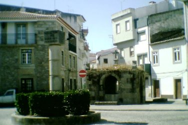 Monumento de Elevação a Vila e Fonte Romana, Alcains, Castelo Branco.